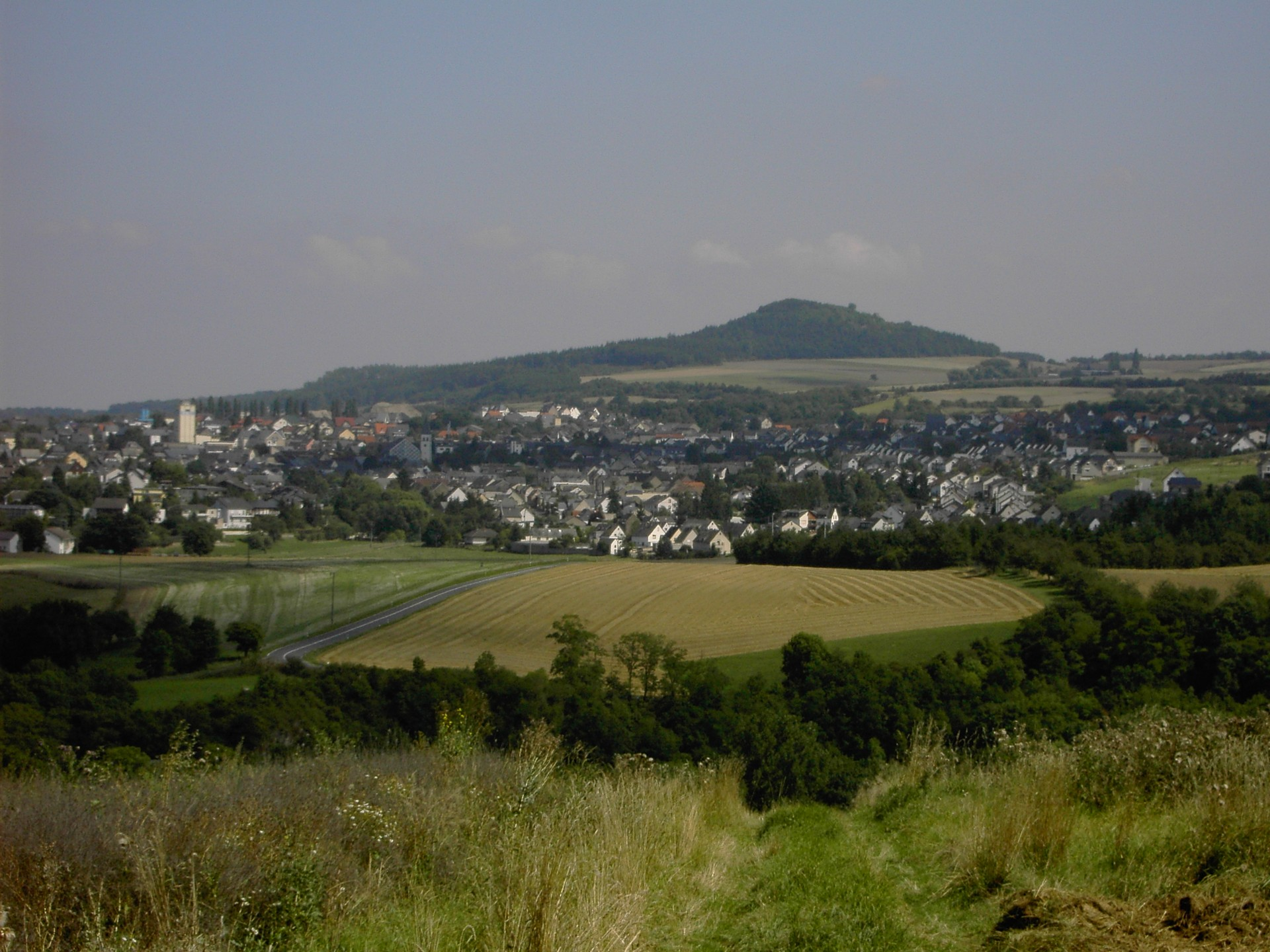 Ochtendung, zwischen dem Standort des Fotografen und dem Ort das Nettetal, im Hintergrund der Karmelenberg (selbst fotgrafiert / gemeinfrei)